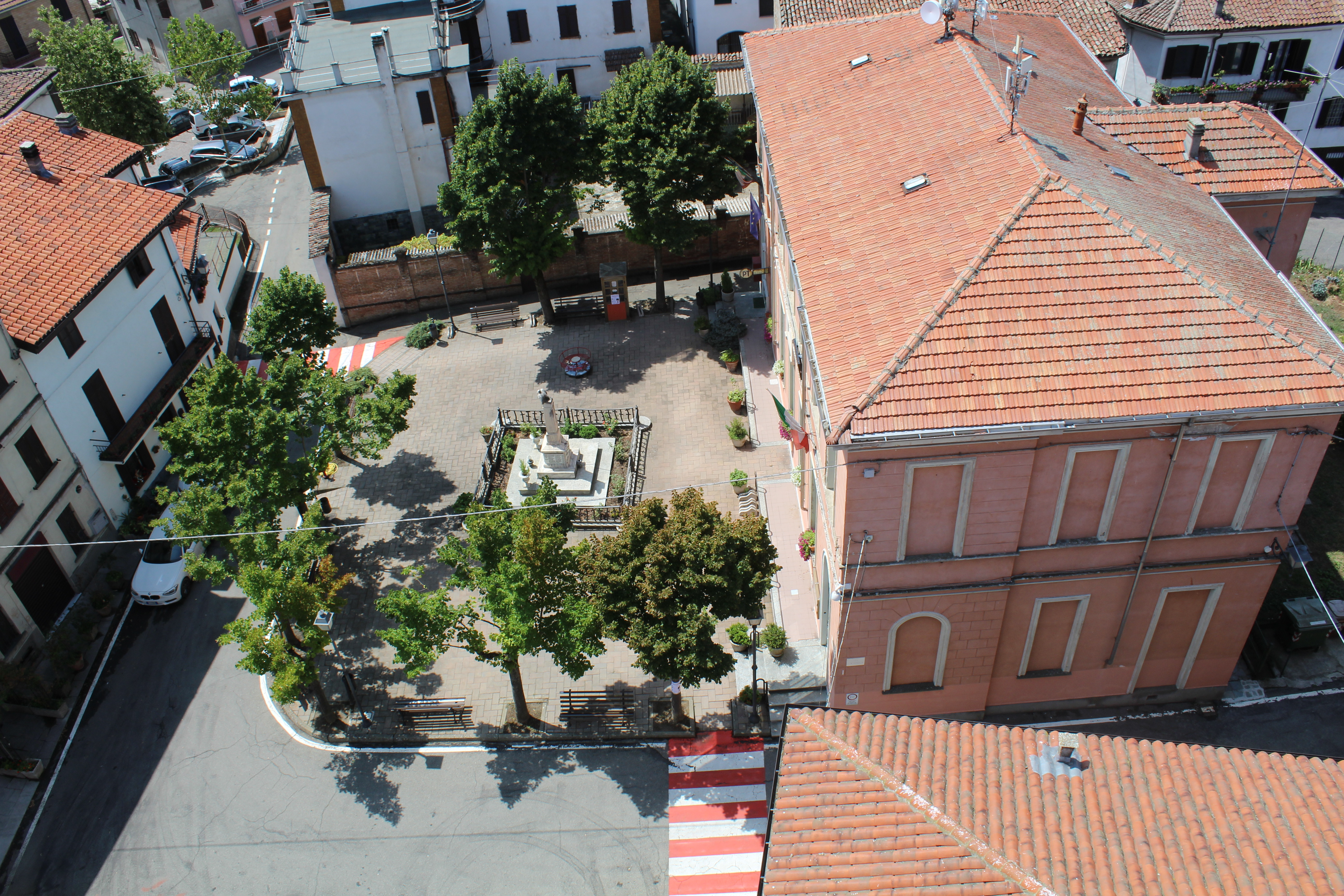 Vista del Comune dall'alto